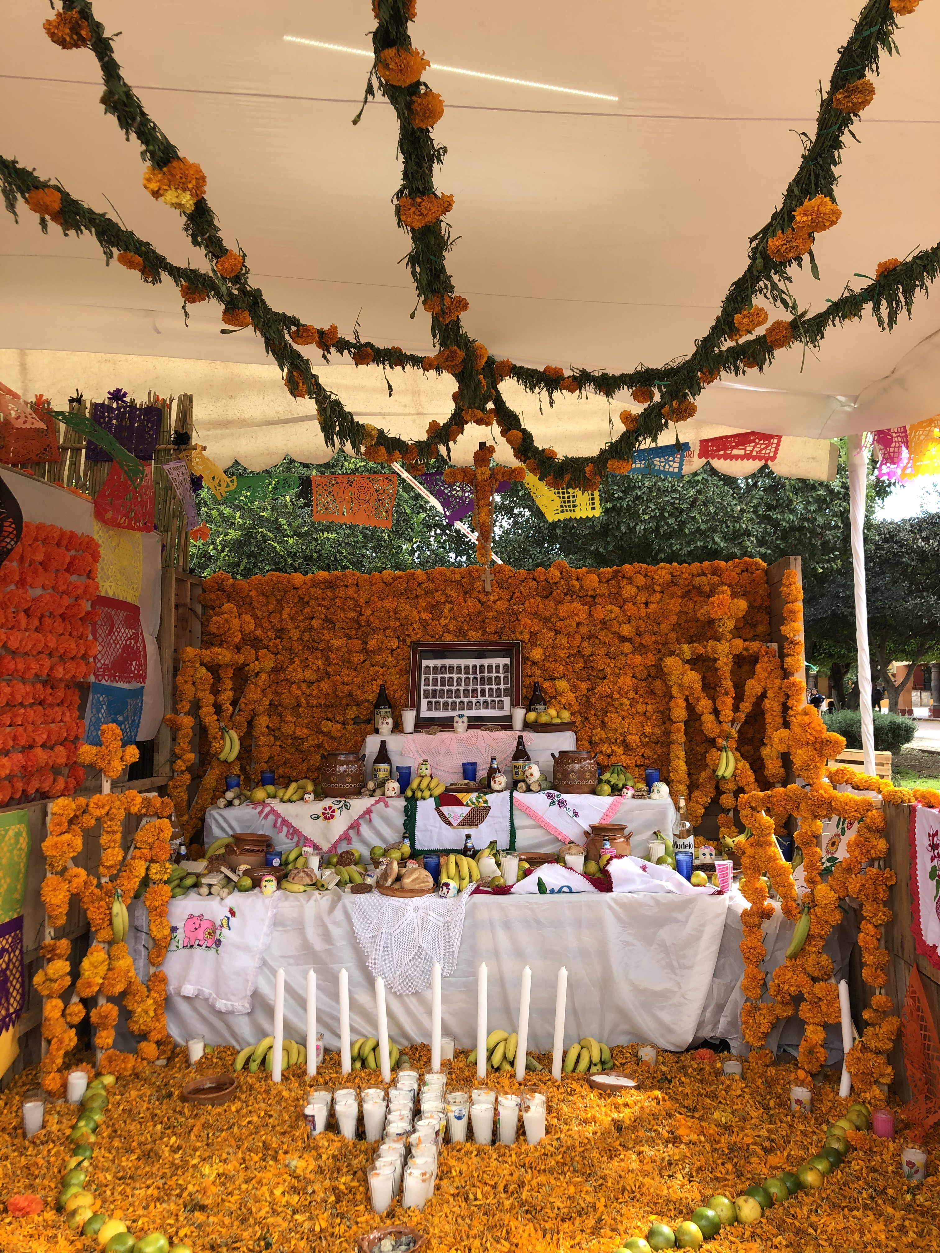 Durante el día de muertos en el pueblo Tequisquiapan es muy comun encontrar representación de diferentes Ofrendas.